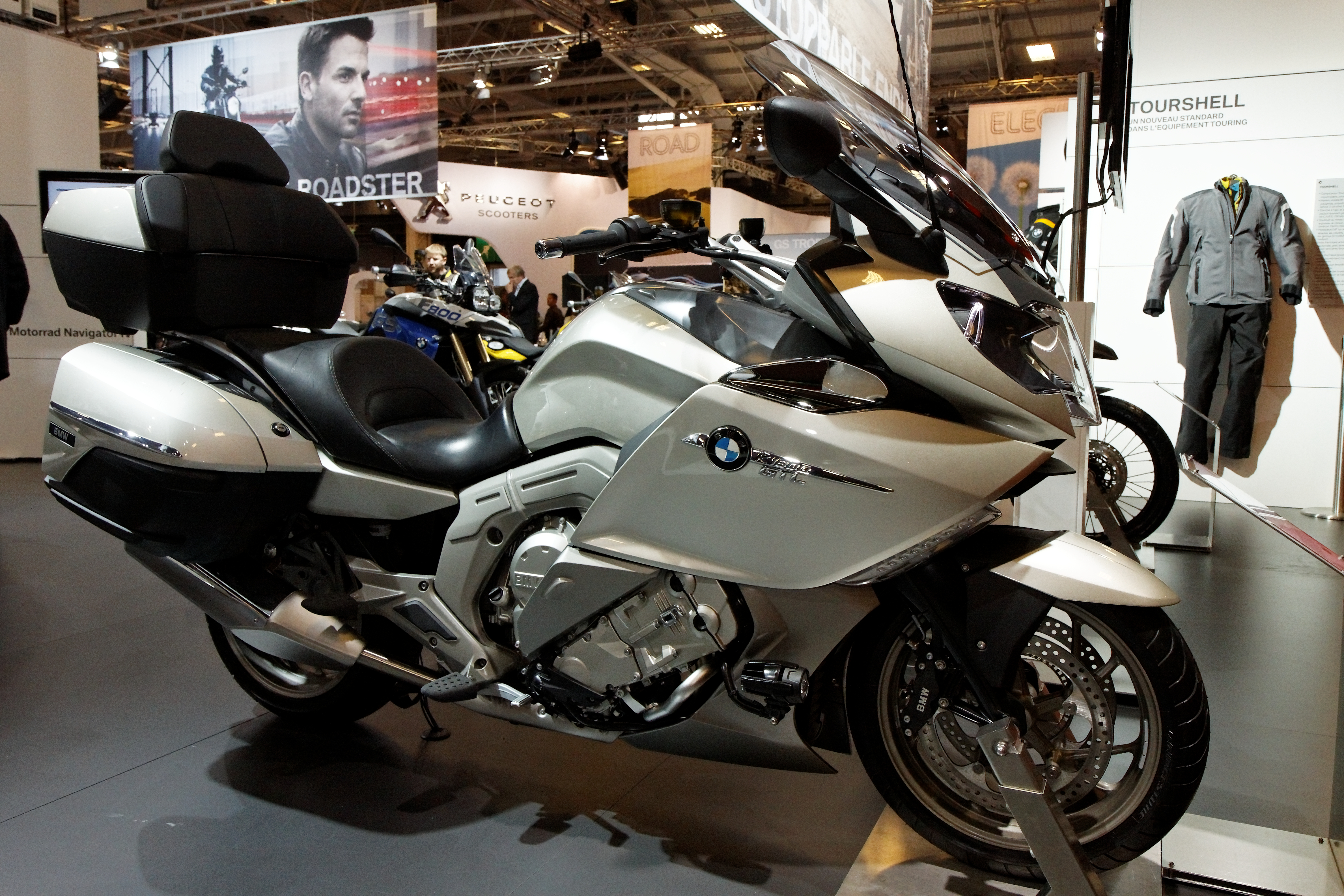 BMW - K 1600 GTL